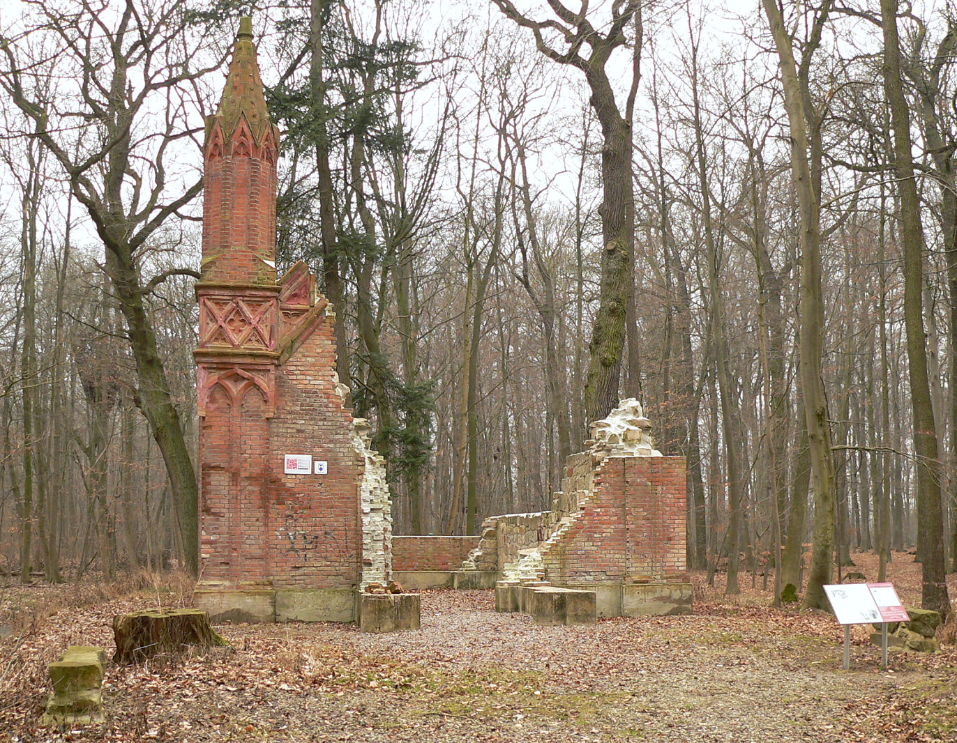 Vorderseite mit früherem Vorbau und Eingang des Mausoleum Graf Carl von Alten